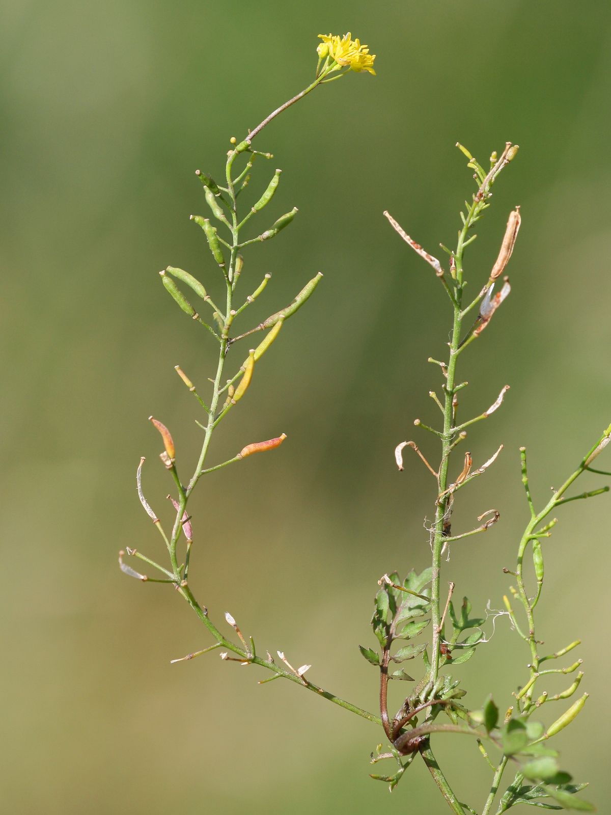 Gewöhnliche Sumpfkresse (Rorippa palustris)